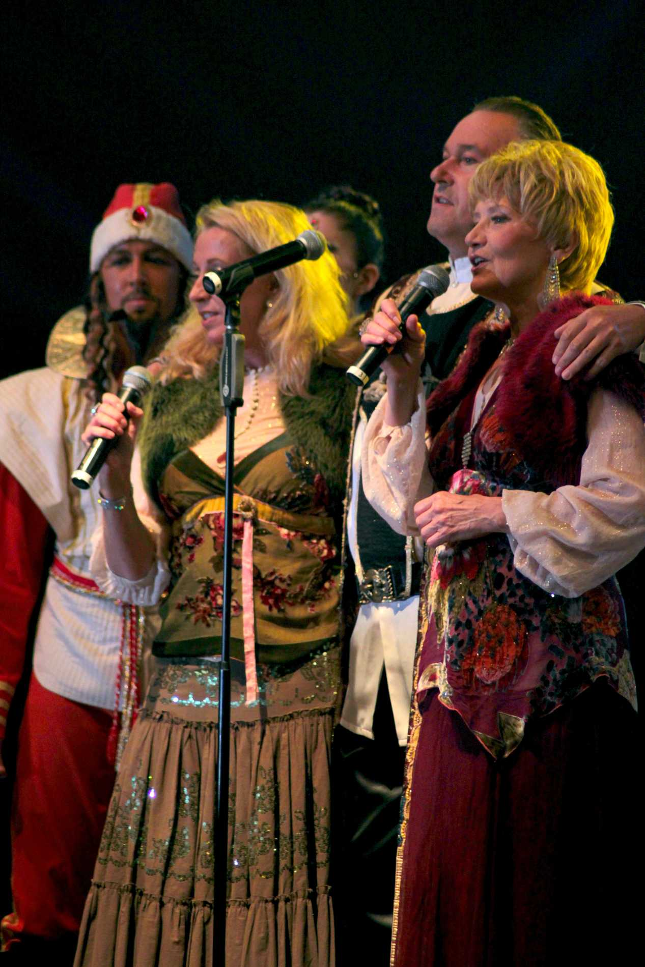 Dschinghis Khan - Ihre größten Hits Tour 2009